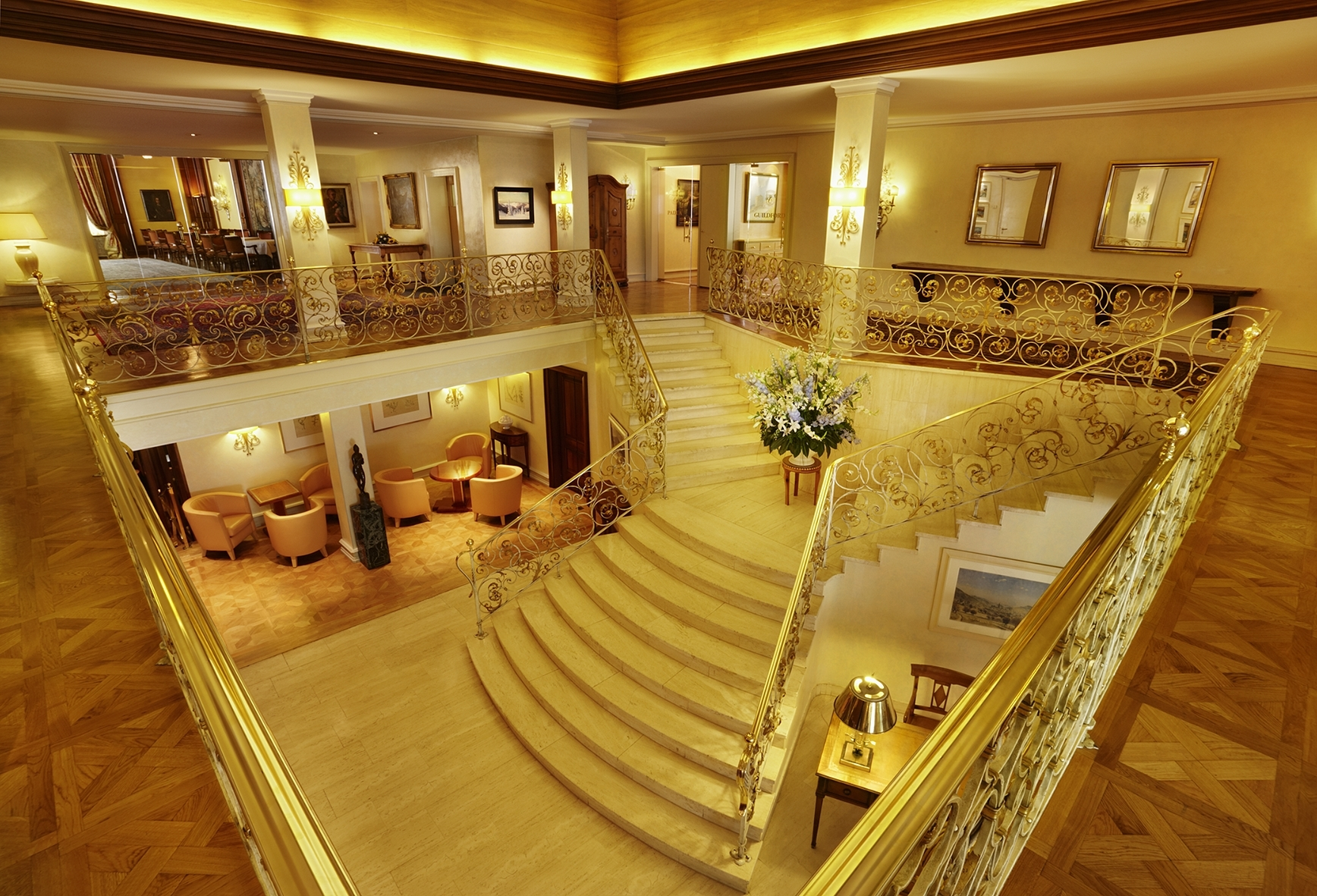 Die prächtige Eingangshalle des Colombi Hotels